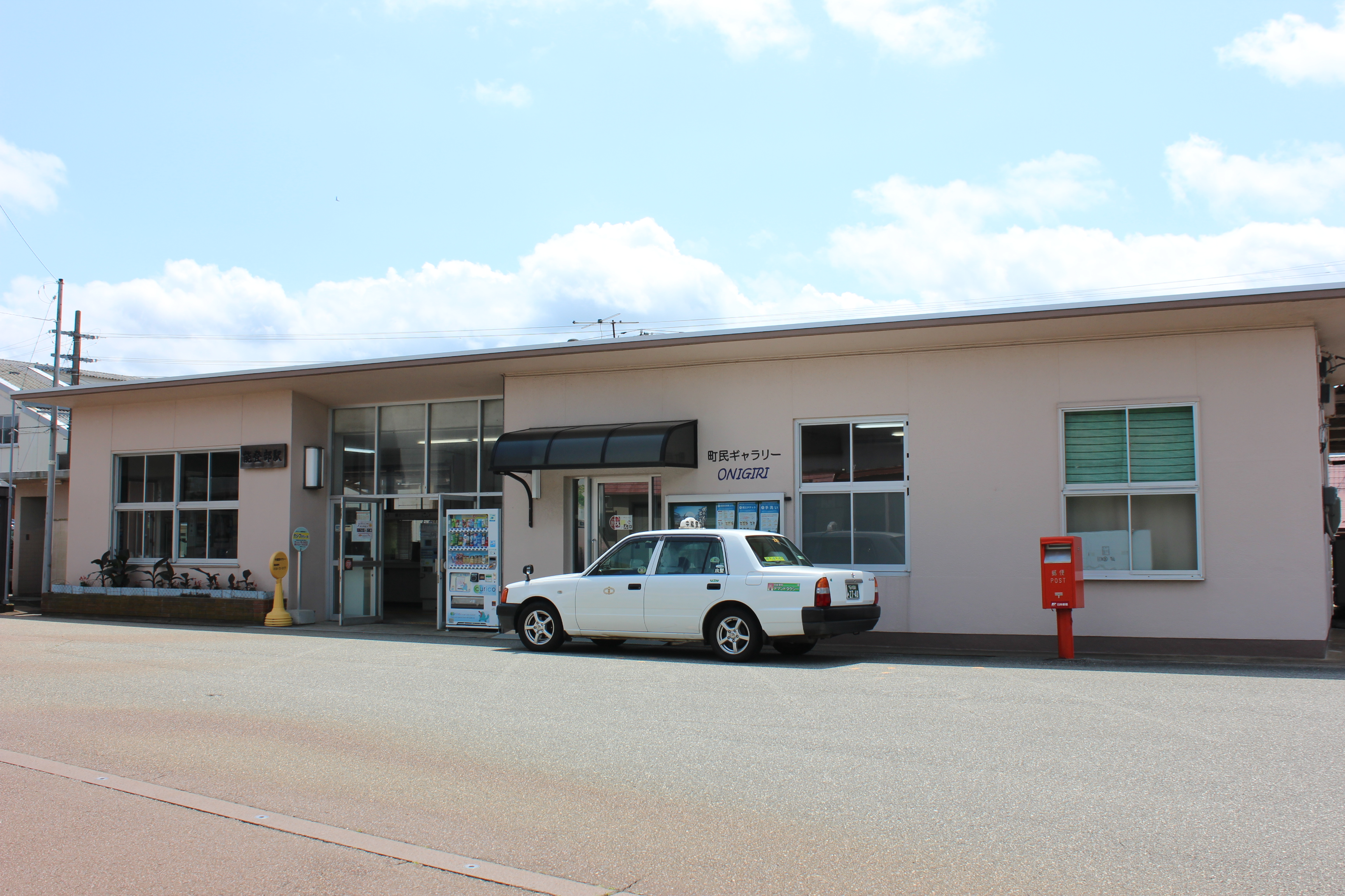 能登部駅駅舎 Canon EOS Kiss X5